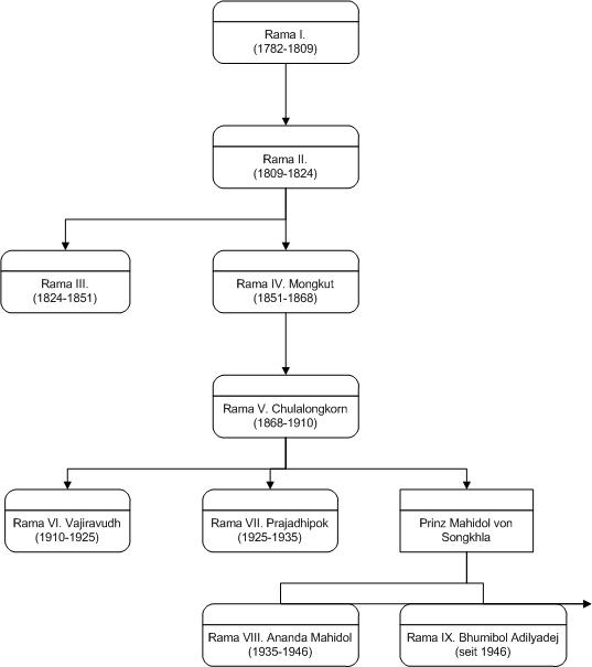 Stammbaum der Chakri-Dynastie (Genealogy of the Chakri dynasty)